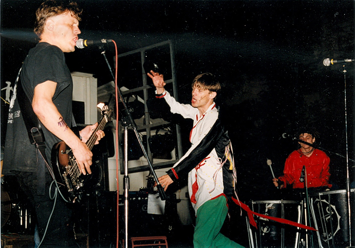 Vágtázó Halottkémek koncert: Soós Lajos (Szónusz), Grandpierre Atilla, Balatoni Endre (Boli). Budapest.